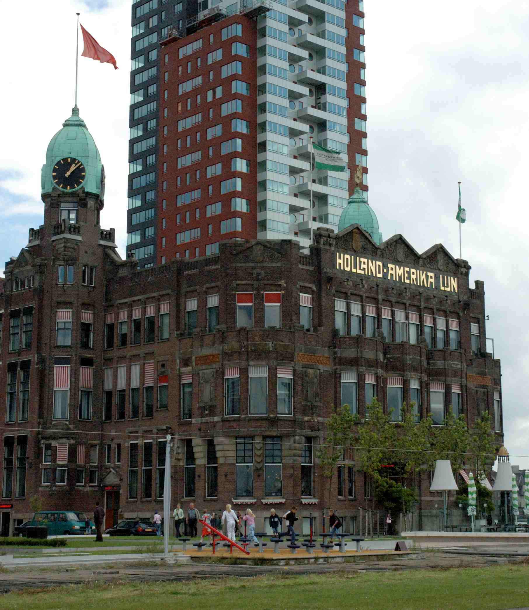 voormalig hoofdkantoor HAL, thans hotel New York